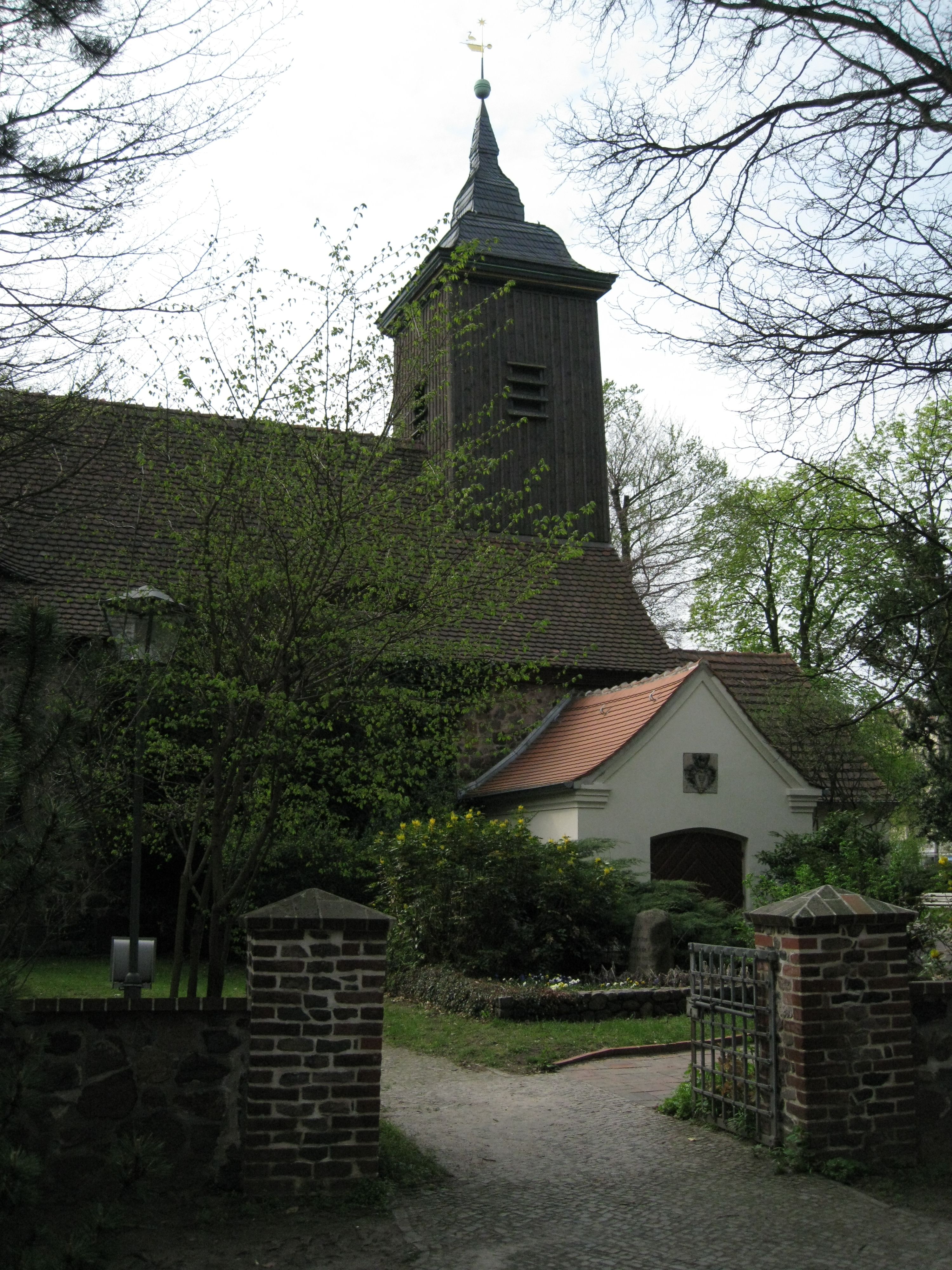 Dorfkirche Lichterfelde, Gruft der Familie von Bülow im Norden